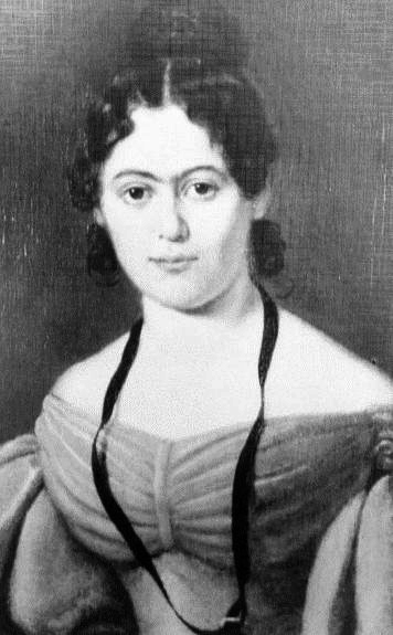 Jenny von Westphalen - Karl Marx Frau